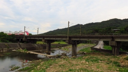 台鐵山線第二三叉河橋 was filmed by TDCKW on 20200626